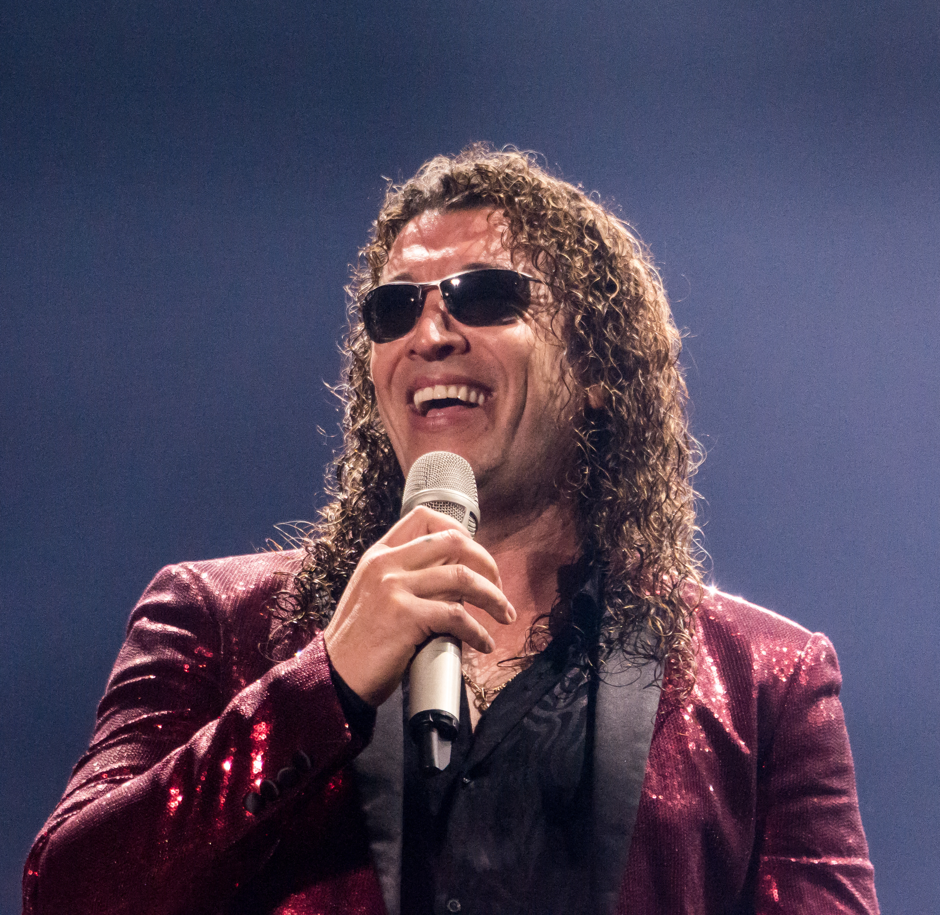 Expo Quillota 2020, Estadio Municipal Lucio Fariña Fernández, Quillota, Región de Valparaíso, Chile